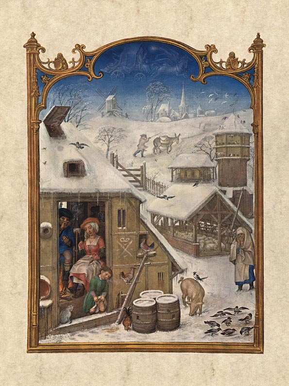 Februar, Brevarium Grimani, fol. 3v (Flemish)